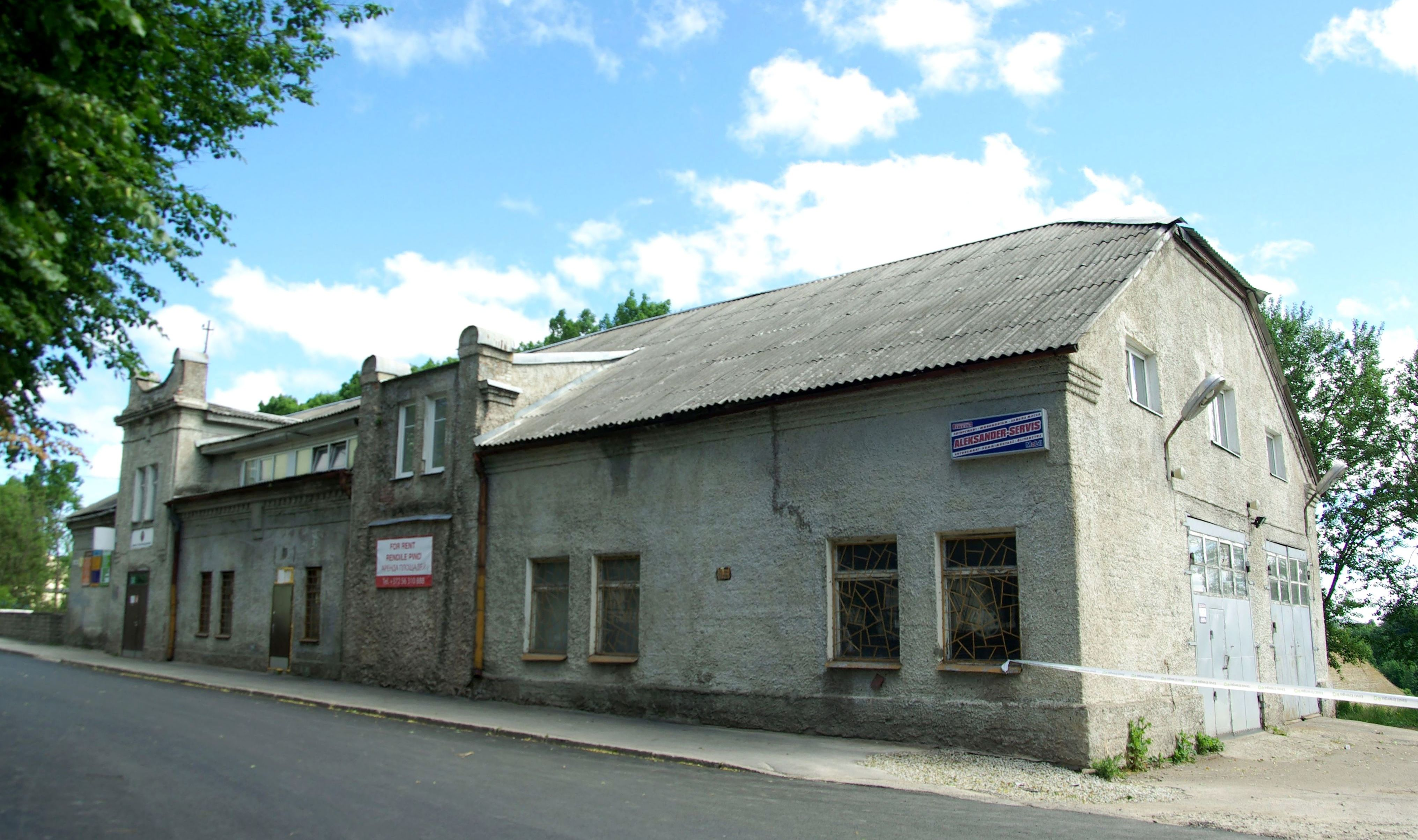 Narva tuletõrjedepoo, 19.saj.